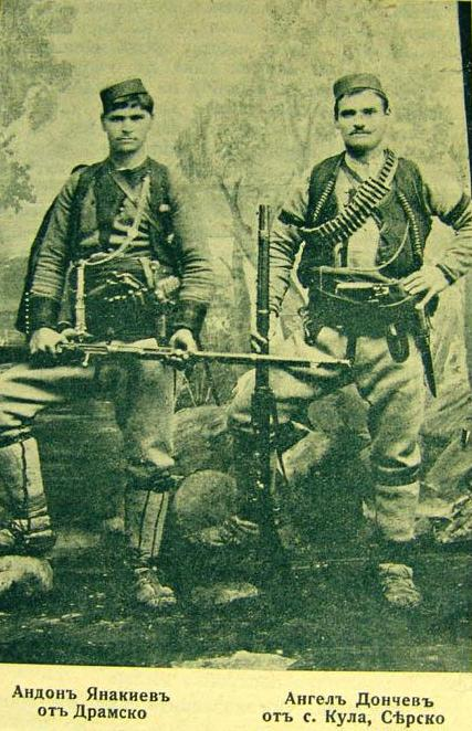 Андон Янакиев и Ангел Дончев.